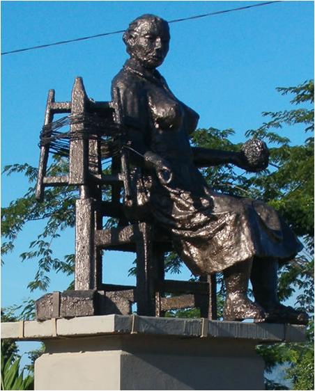 Escultura La Devanadora de Plinio Lambraño, ubicada en el municipio de Morroa Sucre, Colombia